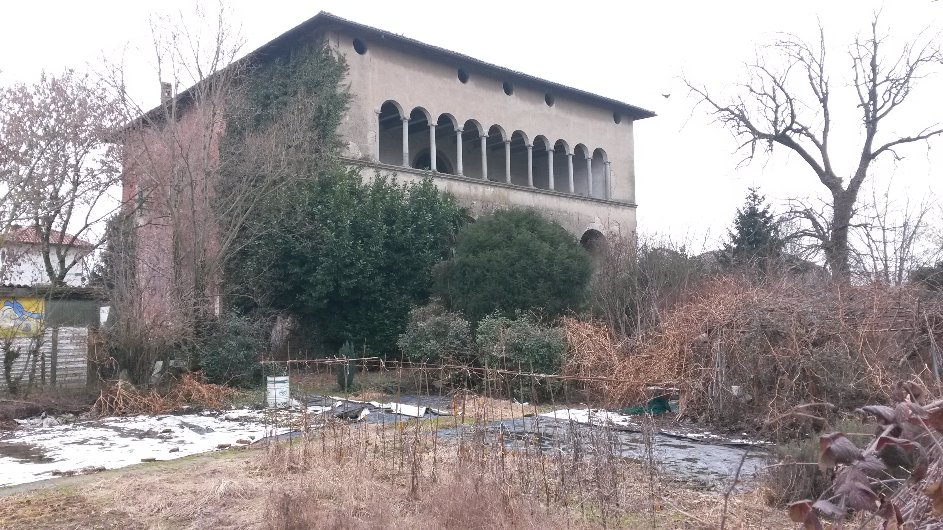 Castello di Buccinasco, nell'omonima frazione, all'interno del Parco agricolo sud di Milano. Fu ampliato e modificato da Ludovico il Moro nel 1463